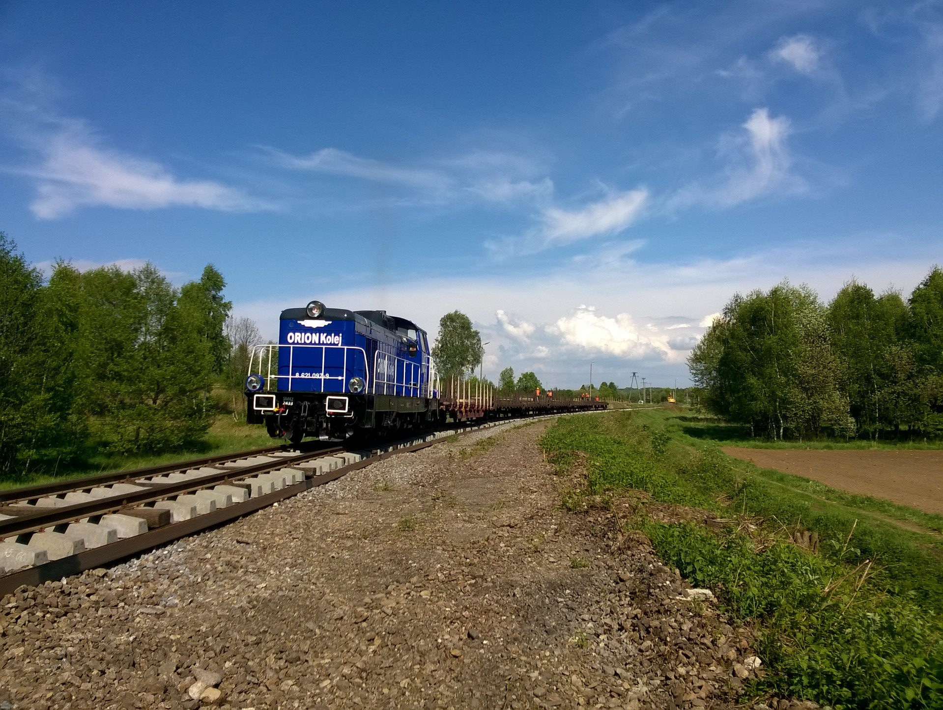 Rewitalizacja linii kolejowej nr 158. Maj 2015, Czyżowice